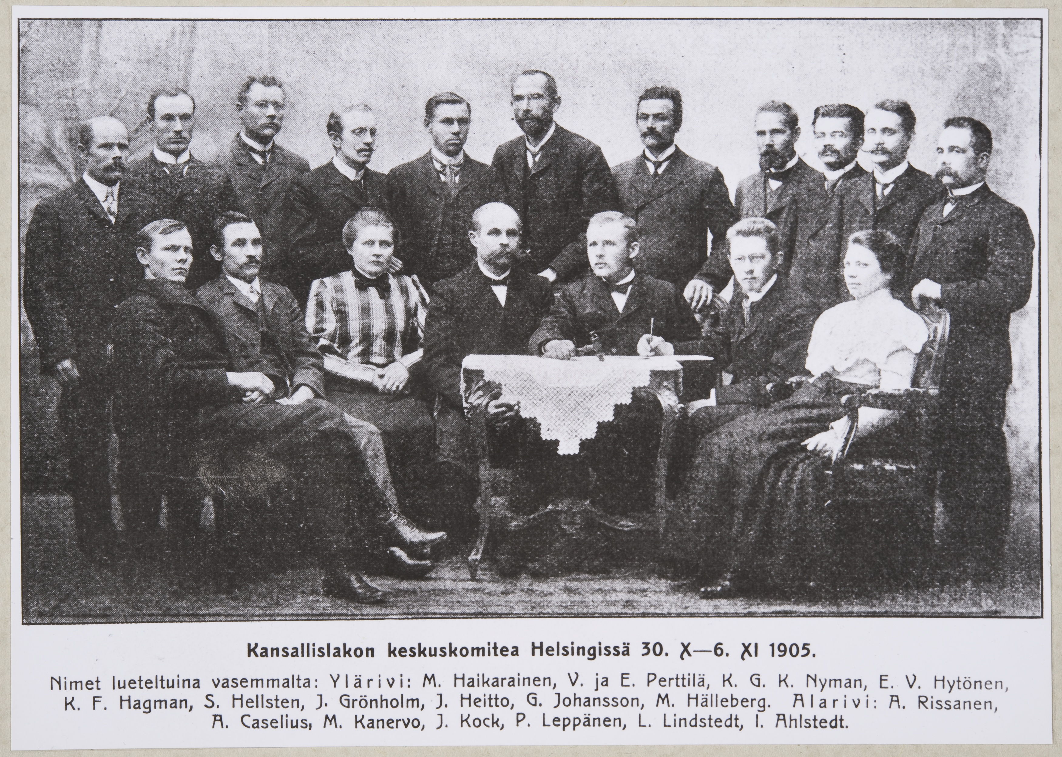 Suurlakon keskuskomitea Helsingissä 30.10. - 6.11.1905.